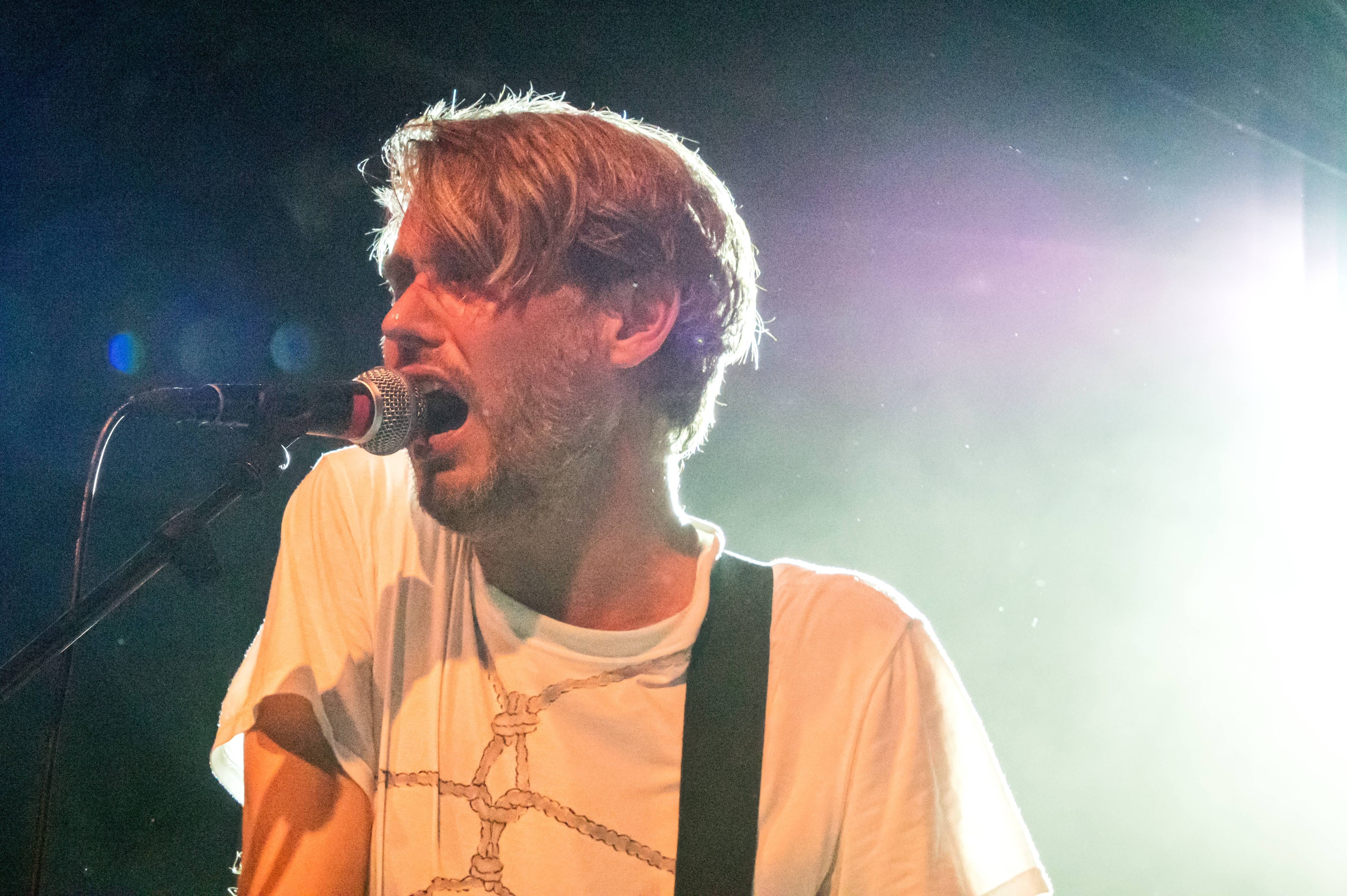 Bilder vom ZMF 2015 Die Rock Band Tocotronic